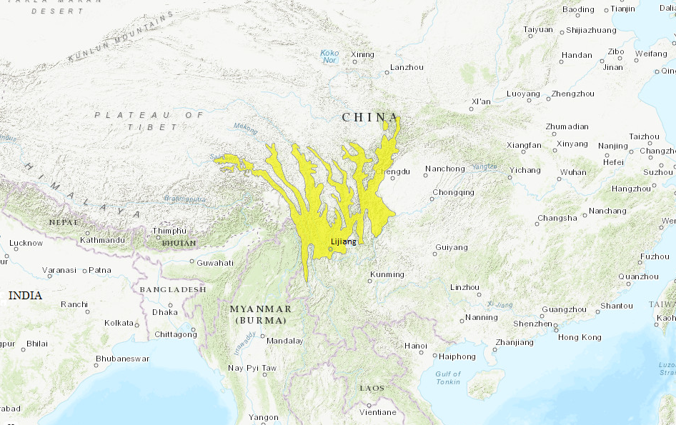 Ecoregione Global 200 - Foreste di conifere dei Monti Hengduan Shan